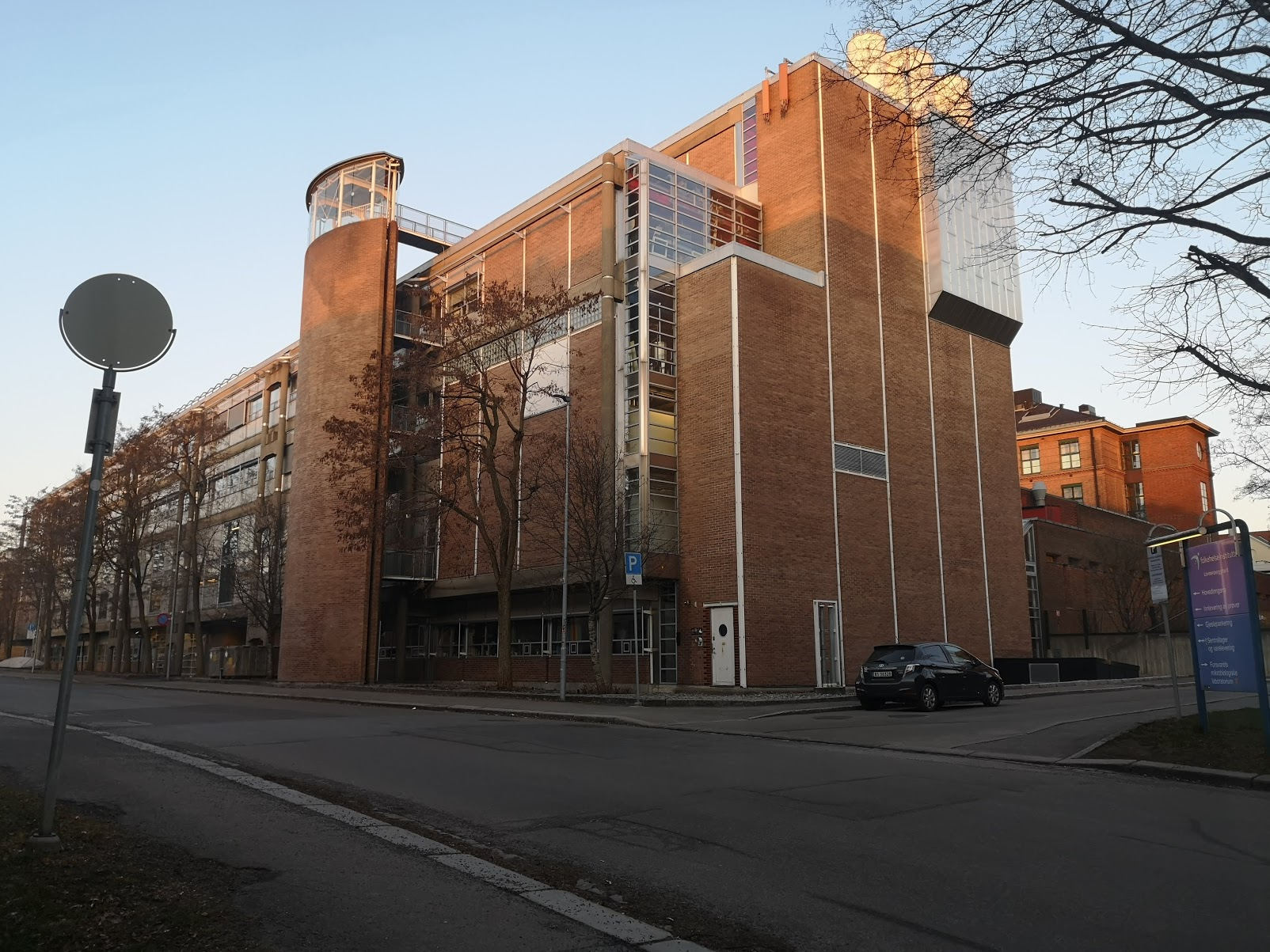 Hovedkontoret til Folkehelseinstituttet i Lovisenberggata 8 i Oslo. Denne nyeste delen av anlegget ble oppført i 1969. Arkitekter Per Cappelen og Harald Ramm Østgård